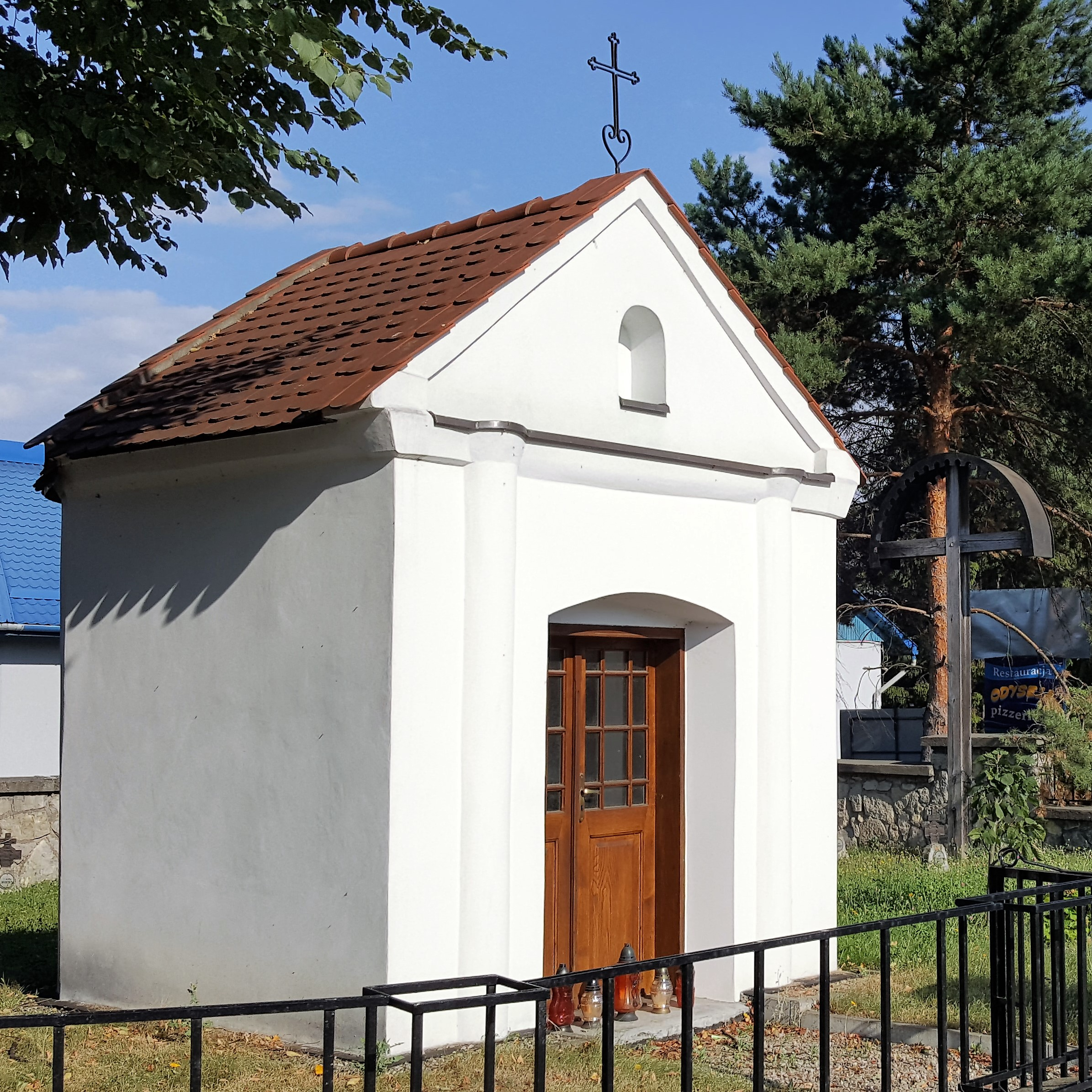 Cmentarz wojenny nr 180 w Tarnowcu. Kapliczka.